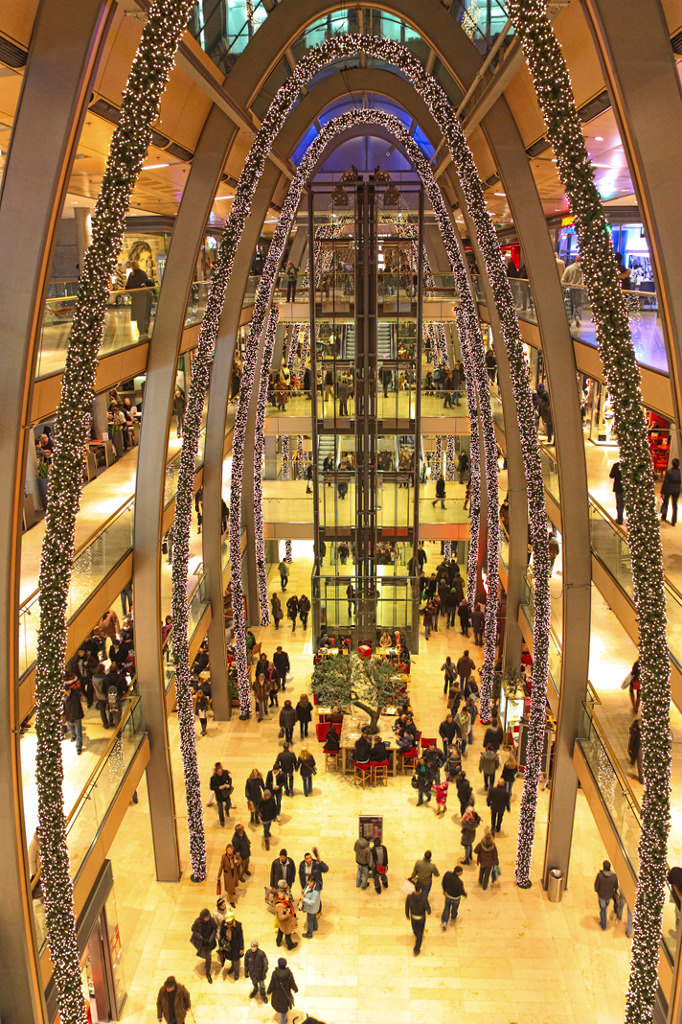 X-Mas Mall